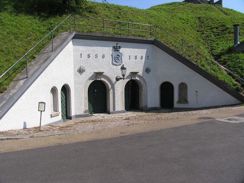 Charlottenlund Fort, indgangen til kassematbygningen